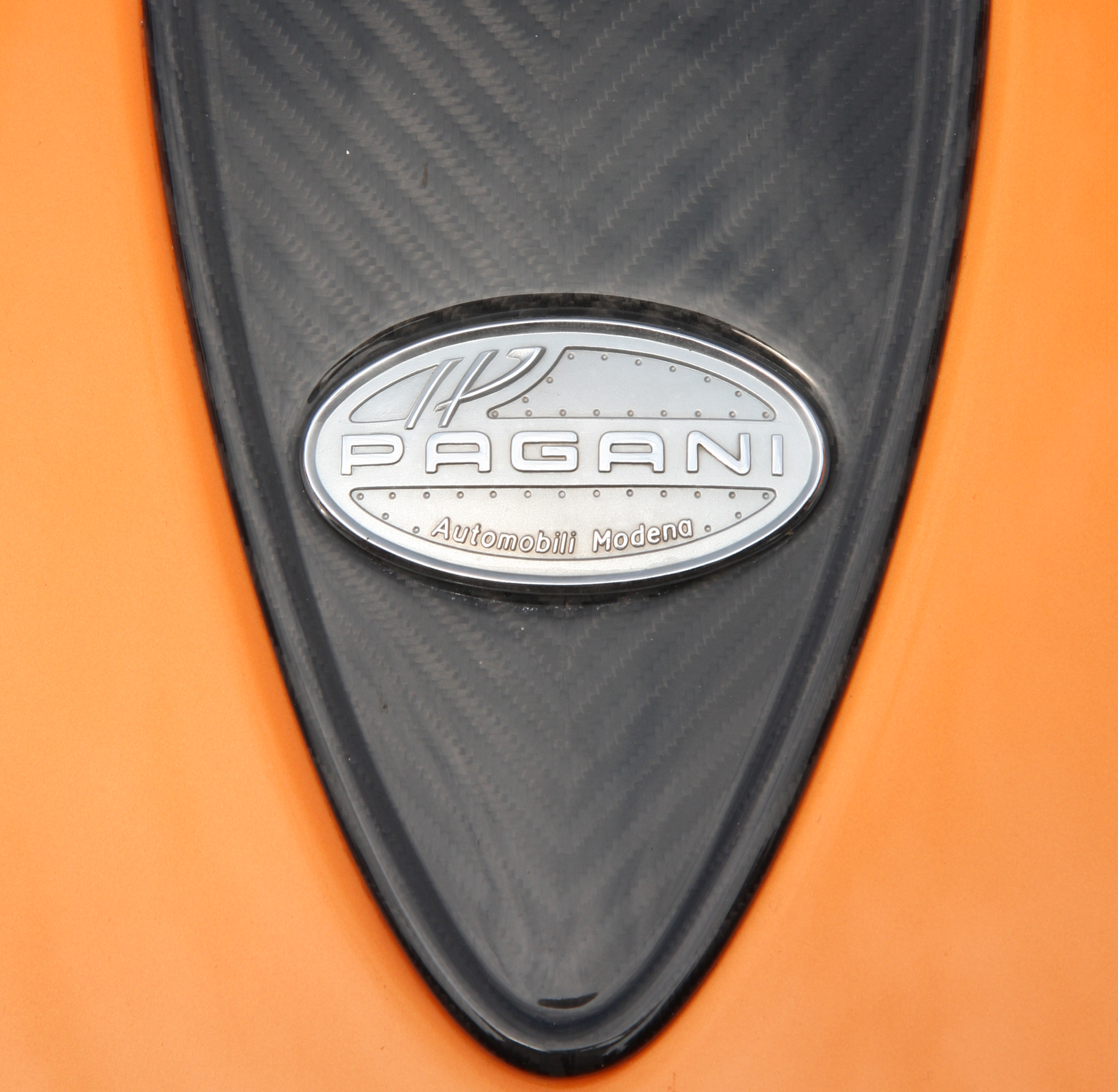 Pagani